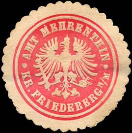 Sealing stamp Title: Amt Mehrenthin - Kreis Friedeberg Description: rot, weiß, geprägt Place: size: 3 cm